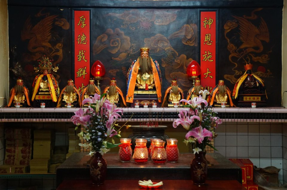 正德宮祭祀神明